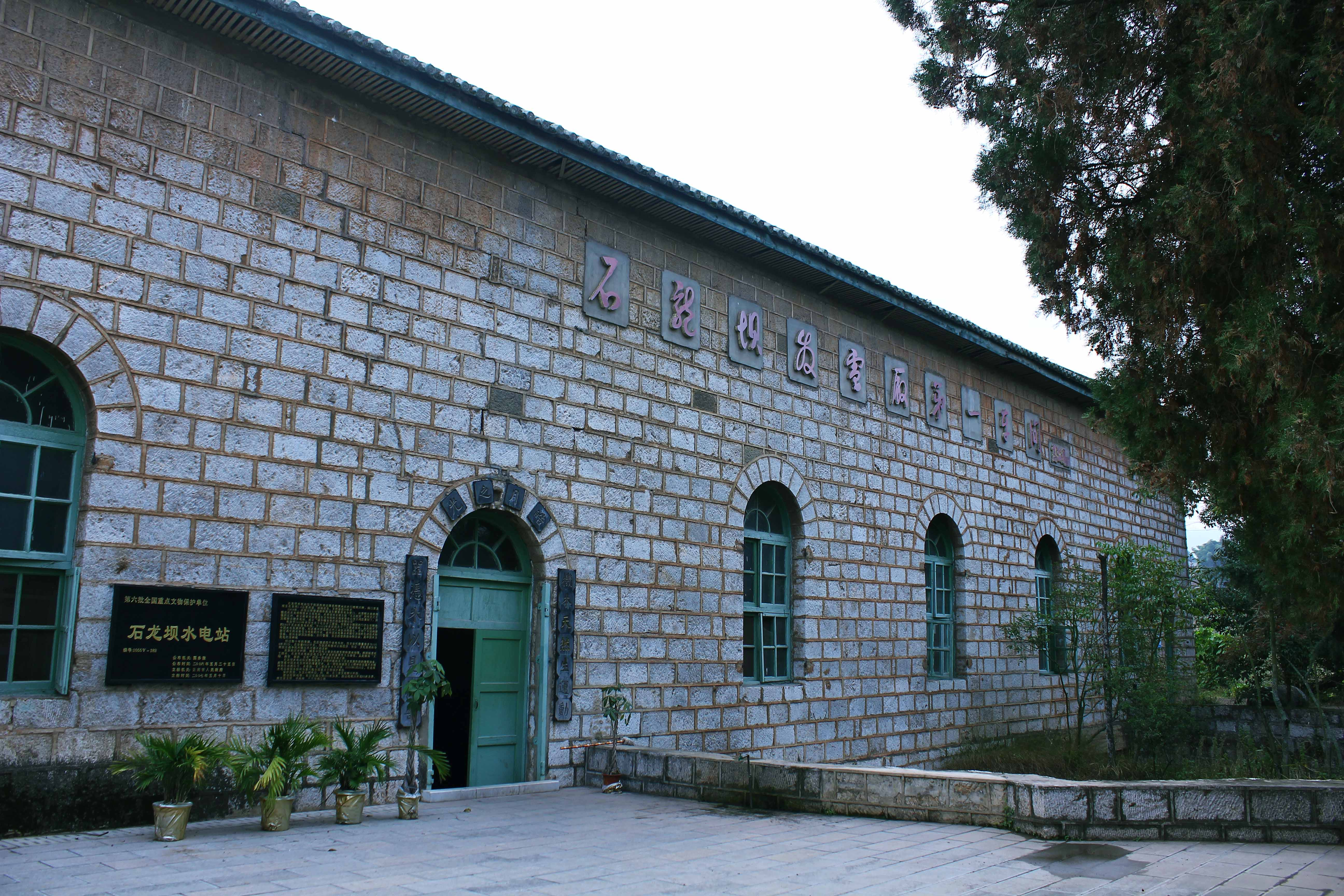 石龙坝发电厂第一车间